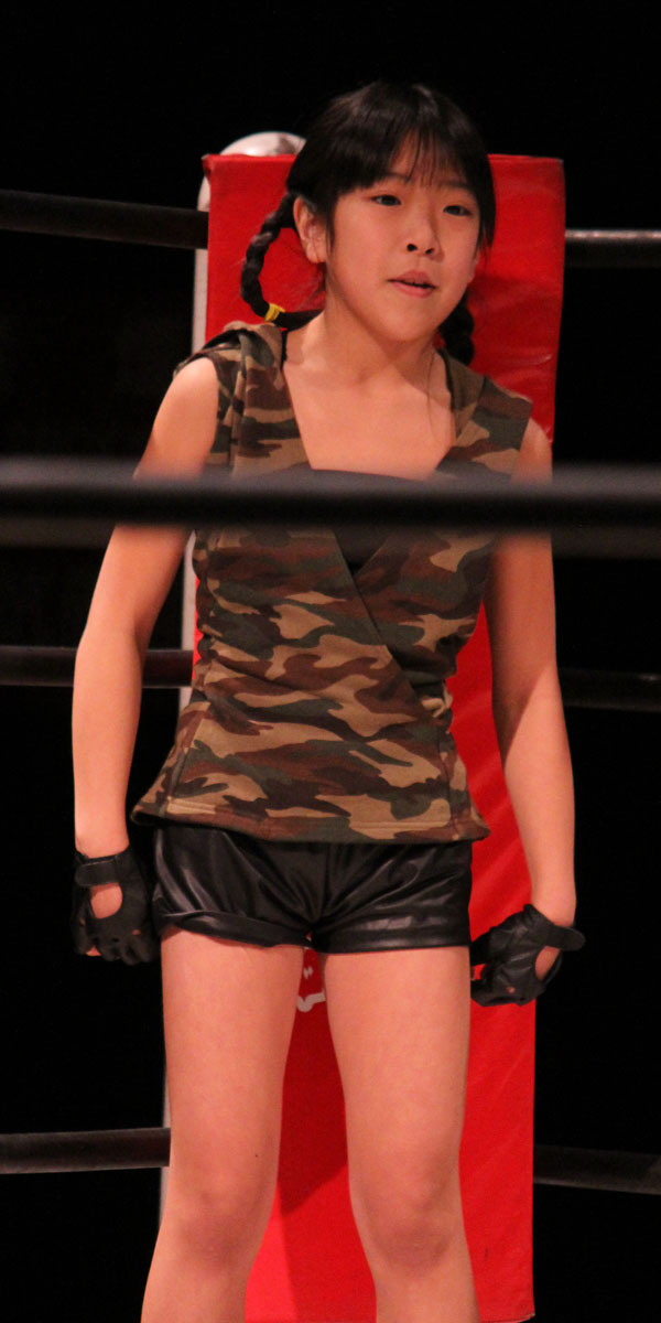 あずみ 2014年2月23日 新木場1stRING